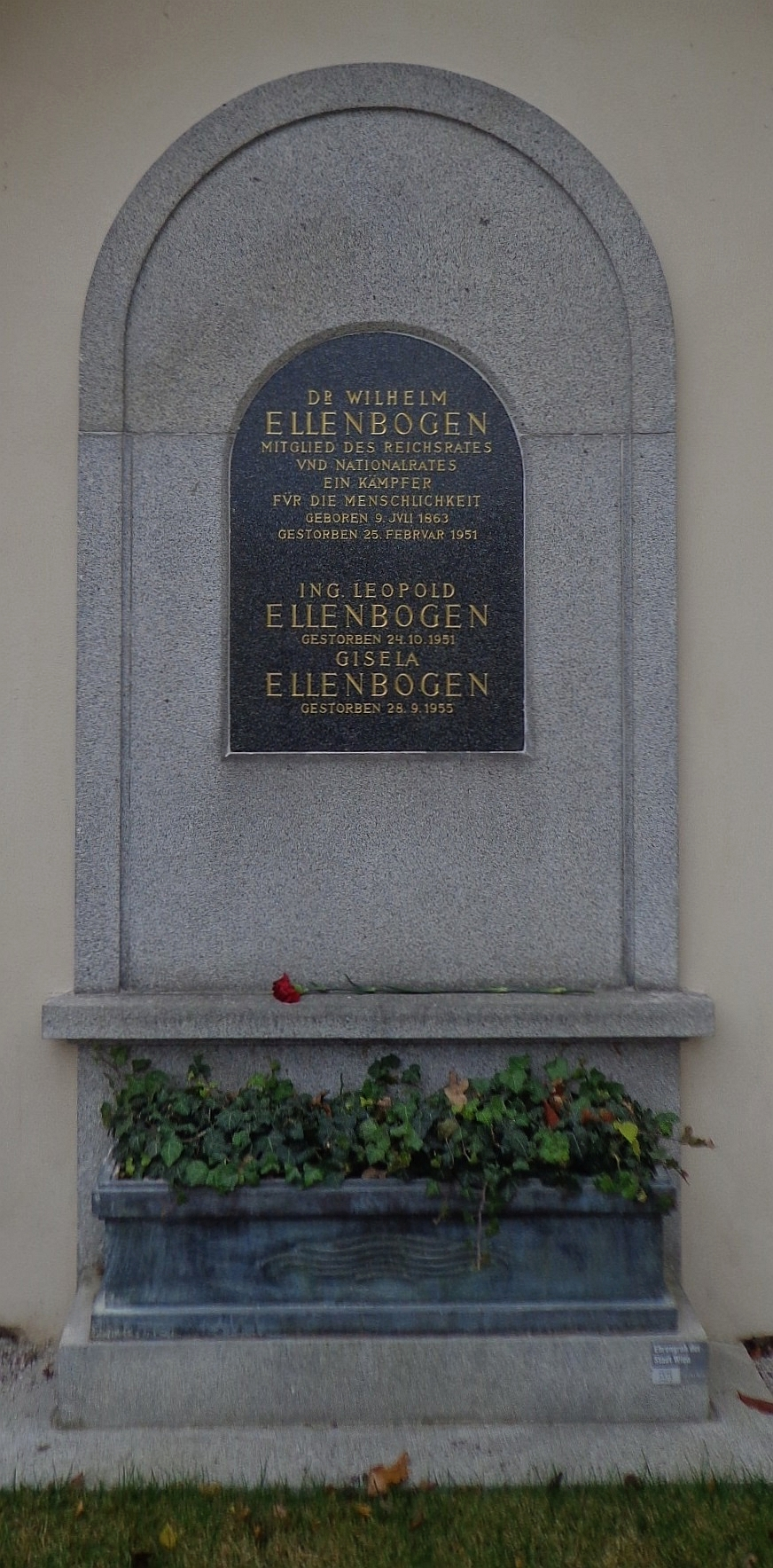 Feuerhalle Simmering - Abteilung ML (Umfassungsmauer): Urnengrab von Wilhelm Ellenbogen